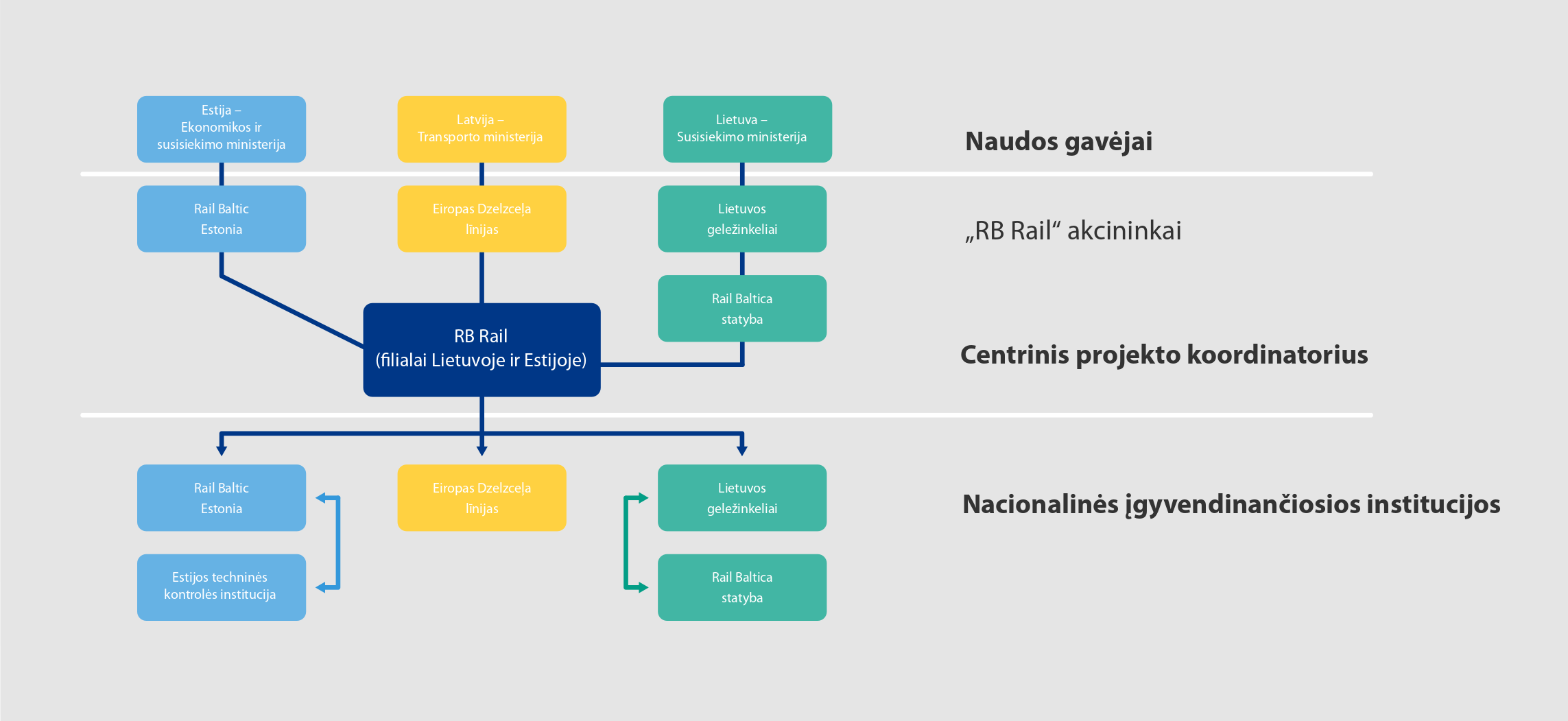 Rail Baltica projekto struktūra